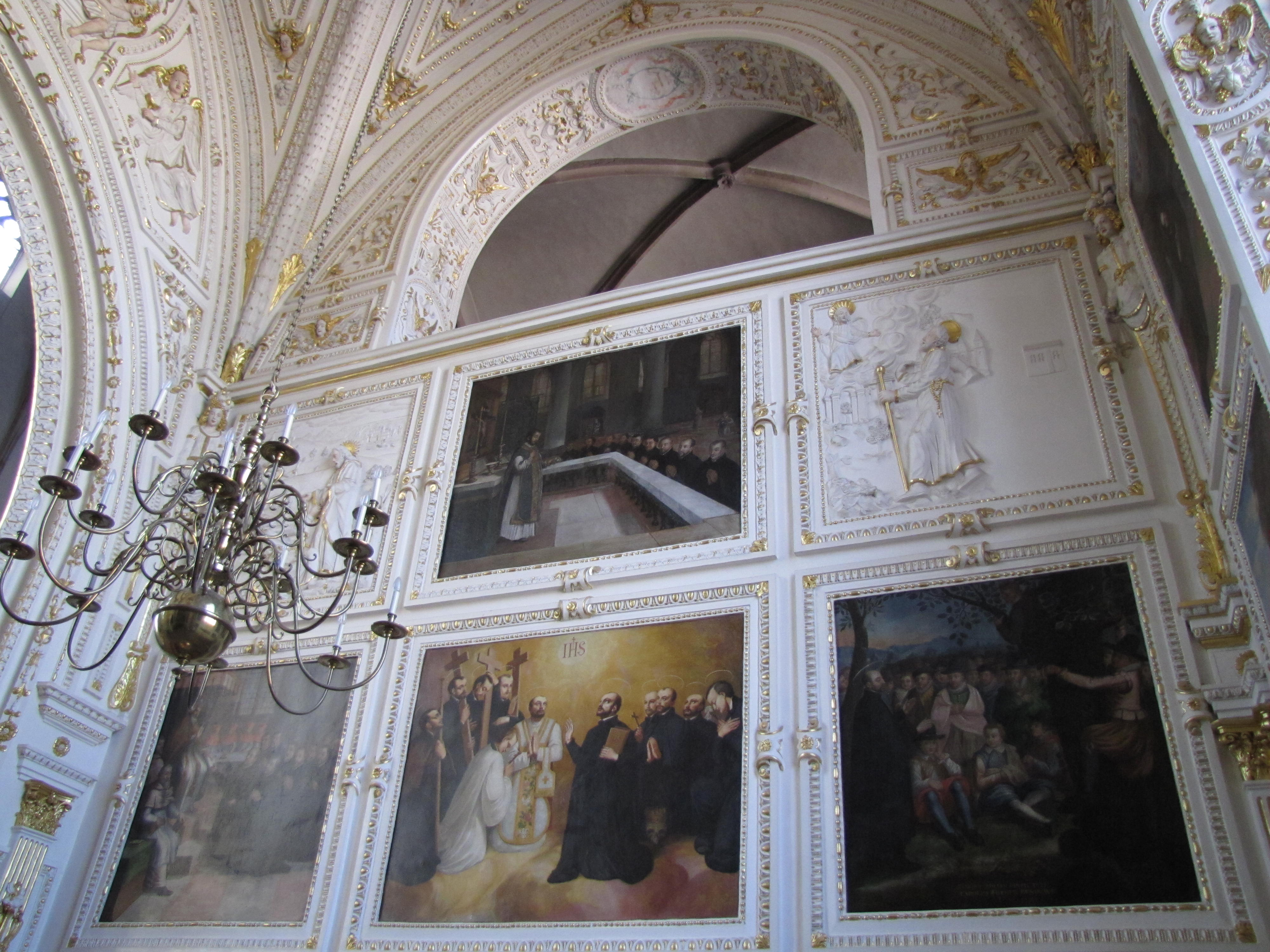 Alsace, Bas-Rhin, Église Saint-Georges de Molsheim, ancienne église des Jésuites (1618) (PA00084798, IA67006097).Transept nord. Décor stuqué (Jean KUHN et Michael CASTELO, XVIIe): Peintures murales "Vie de St-Ignace de Loyola" (Zebedäus MÜLLER, Carolus FISCHER, XVIIe-XVIIIe-XIXe)